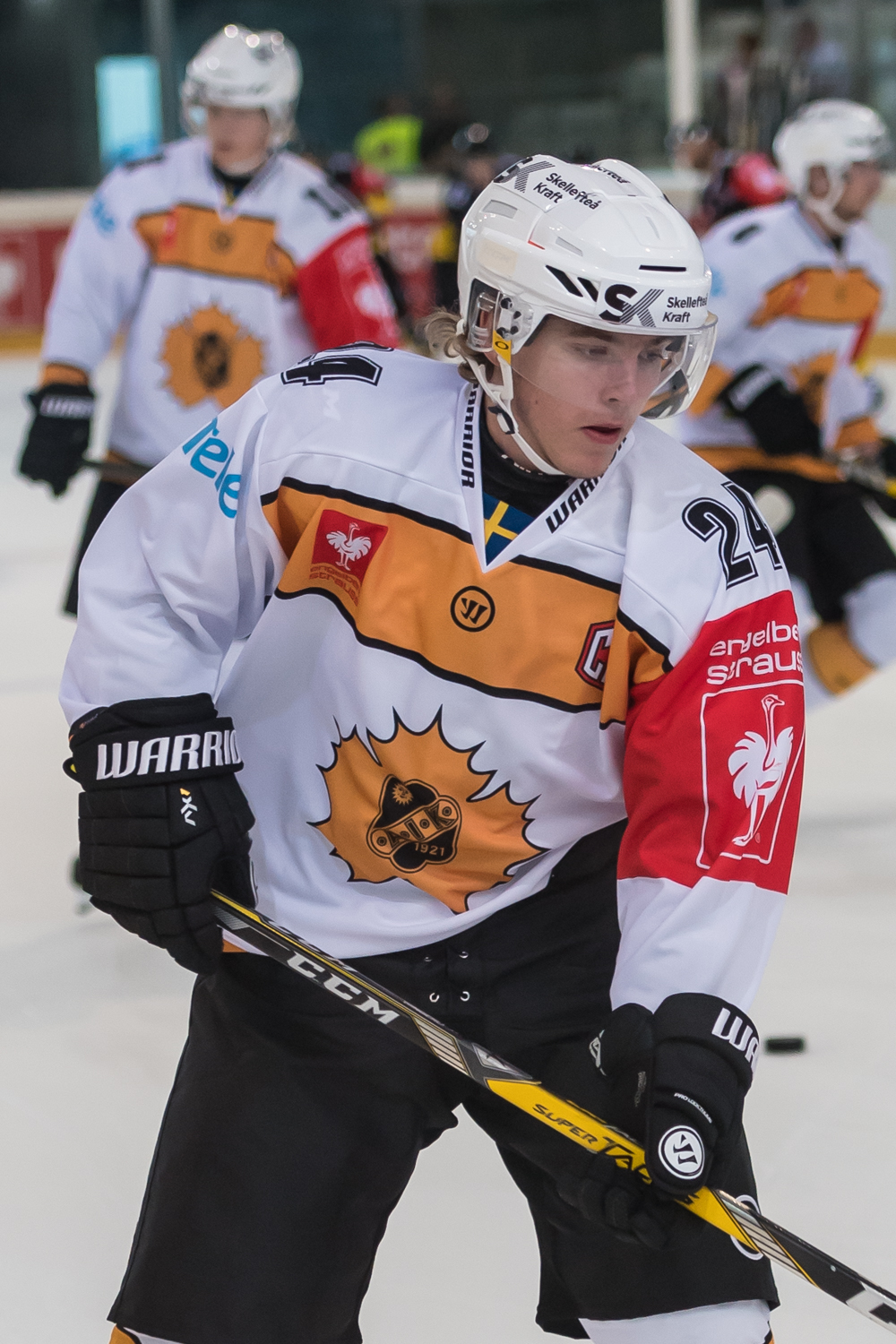 Champions Hockey League - Vienna Capitals vs Skelleftea AIK am 18.08.2016. Bild zeigt Andreas Wingerli (Skelleftea AIK).